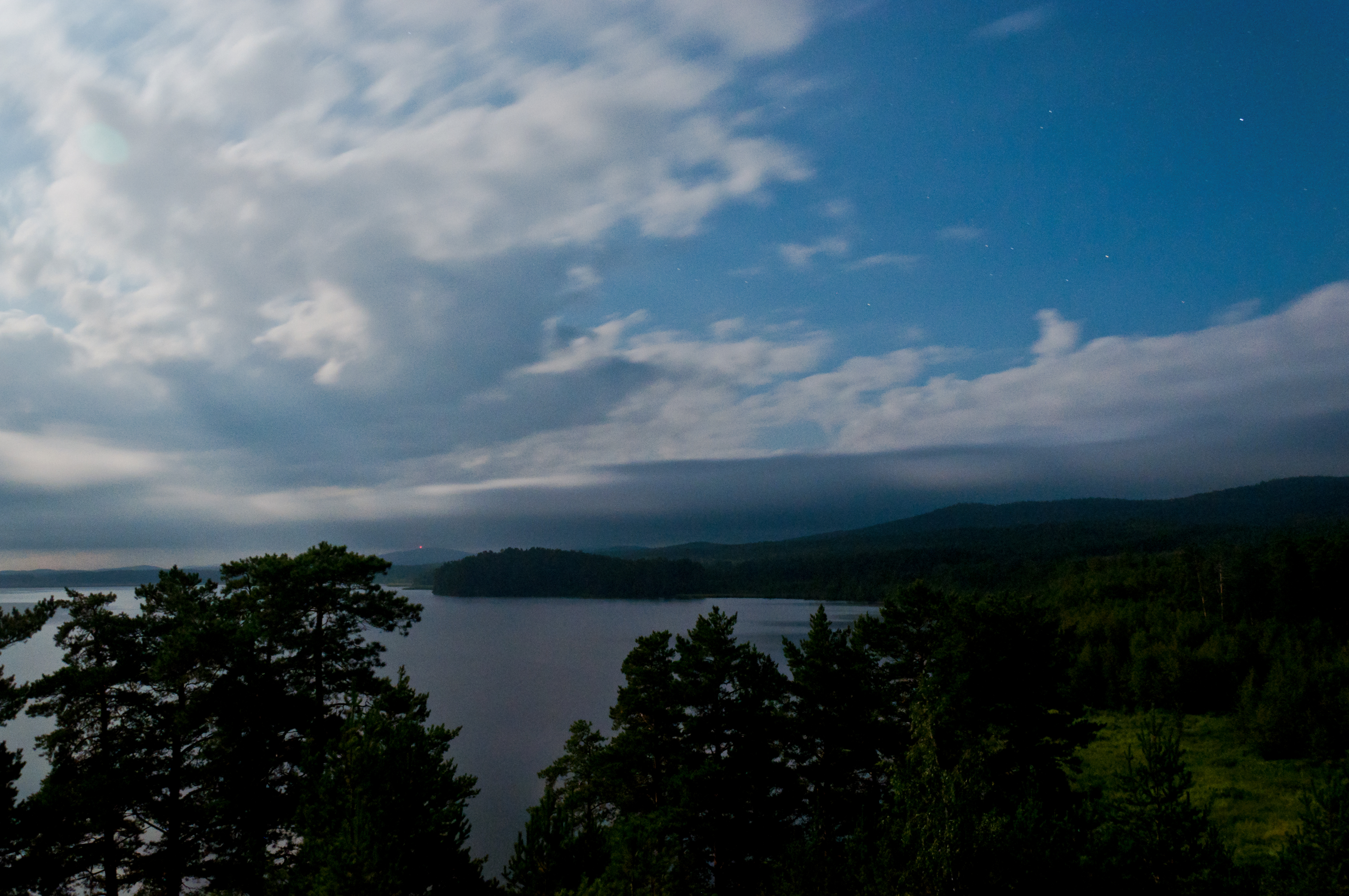 Озеро Сугомак, Кыштымский городской округ This image is related to the protected area of Russia number 7410191